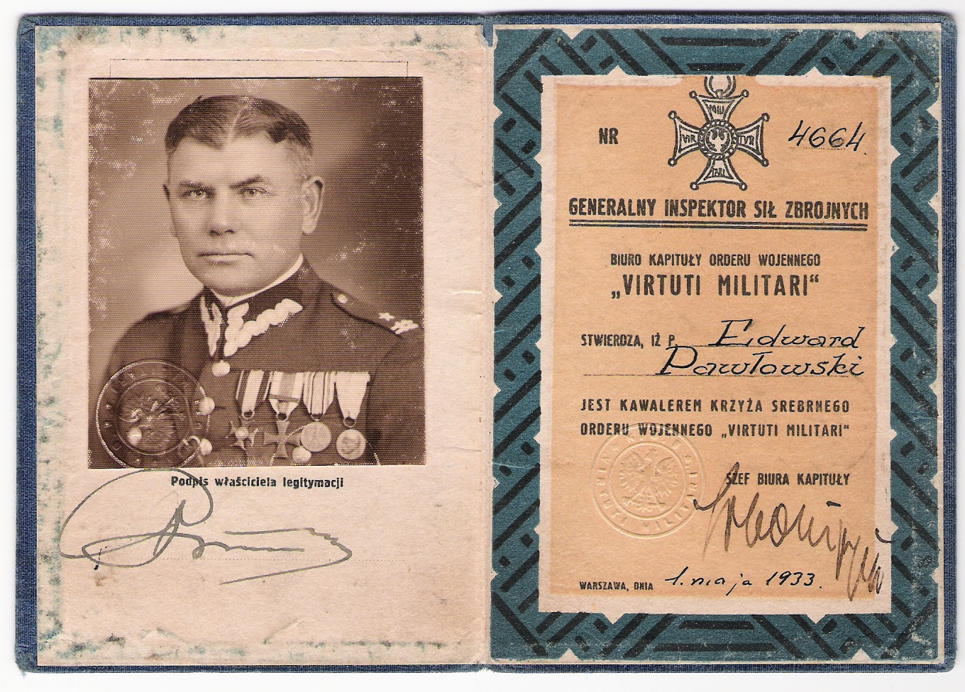 Virtuti Militari legitymacja kawalera orderu wojennego.